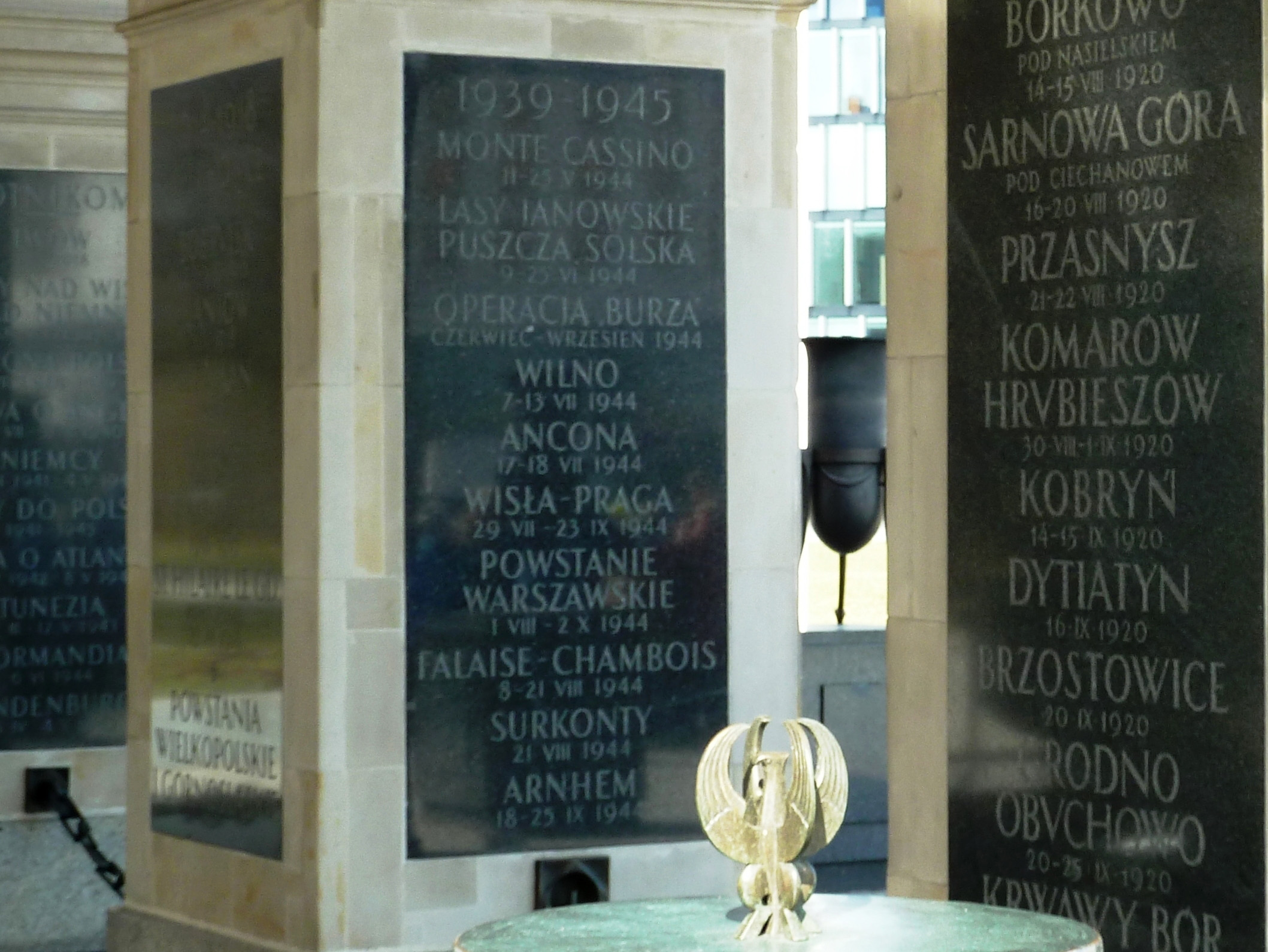 Grób Nieznanego Żołnierza w Warszawie - walki 1939-1945. Na drugiej kolumnie widoczne napisy Operacja „Burza“ czerwiec - wrzesień 1944, Wilno 7-13.VII. 1944